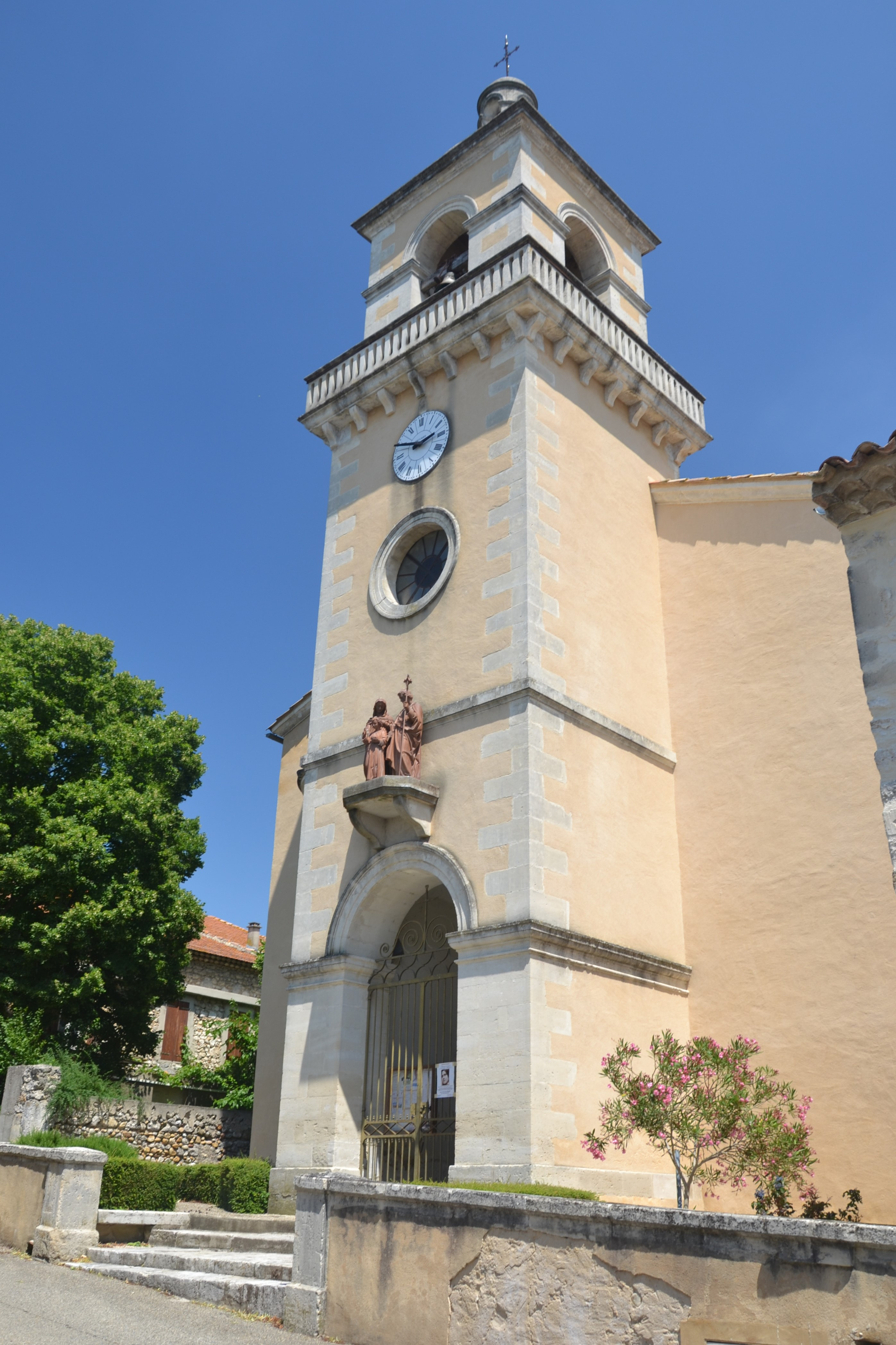 église des Granges-Gontardes